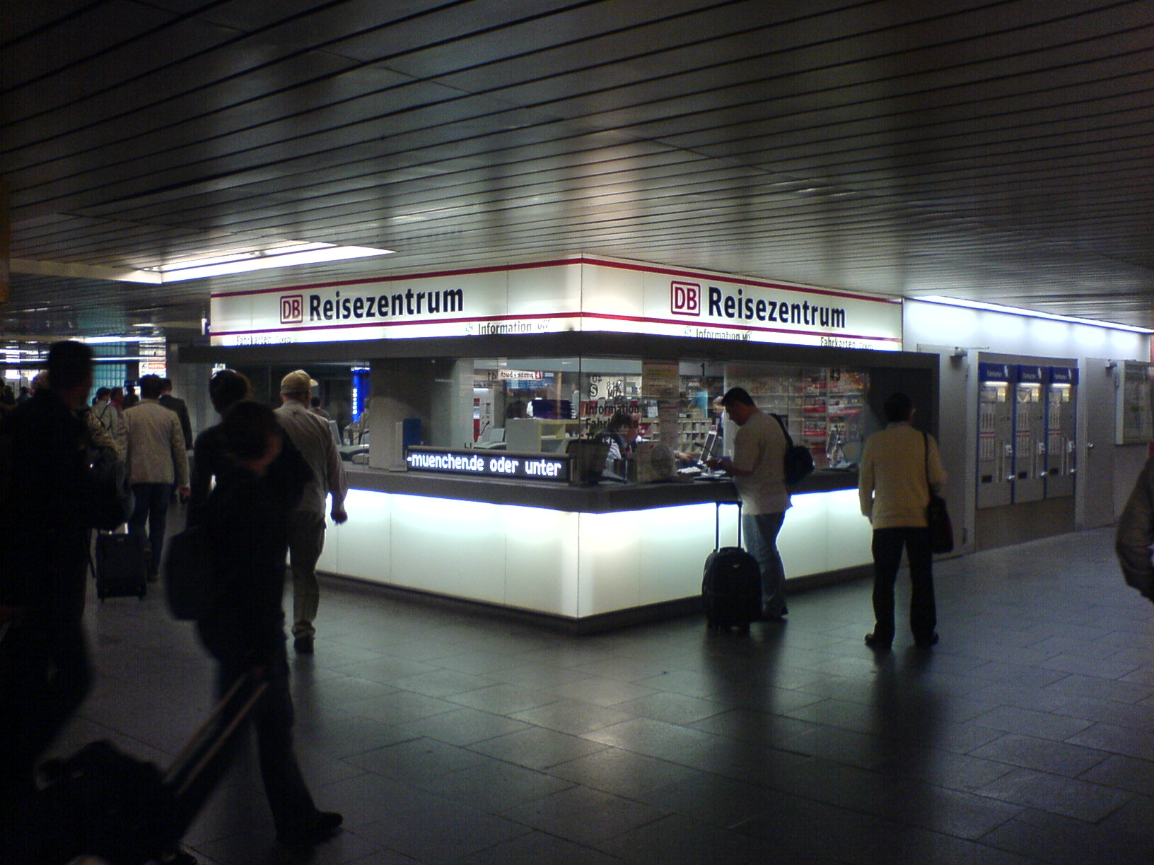 Reisezentrum der DB im Zwischengeschoß des Hauptbahnhofes München